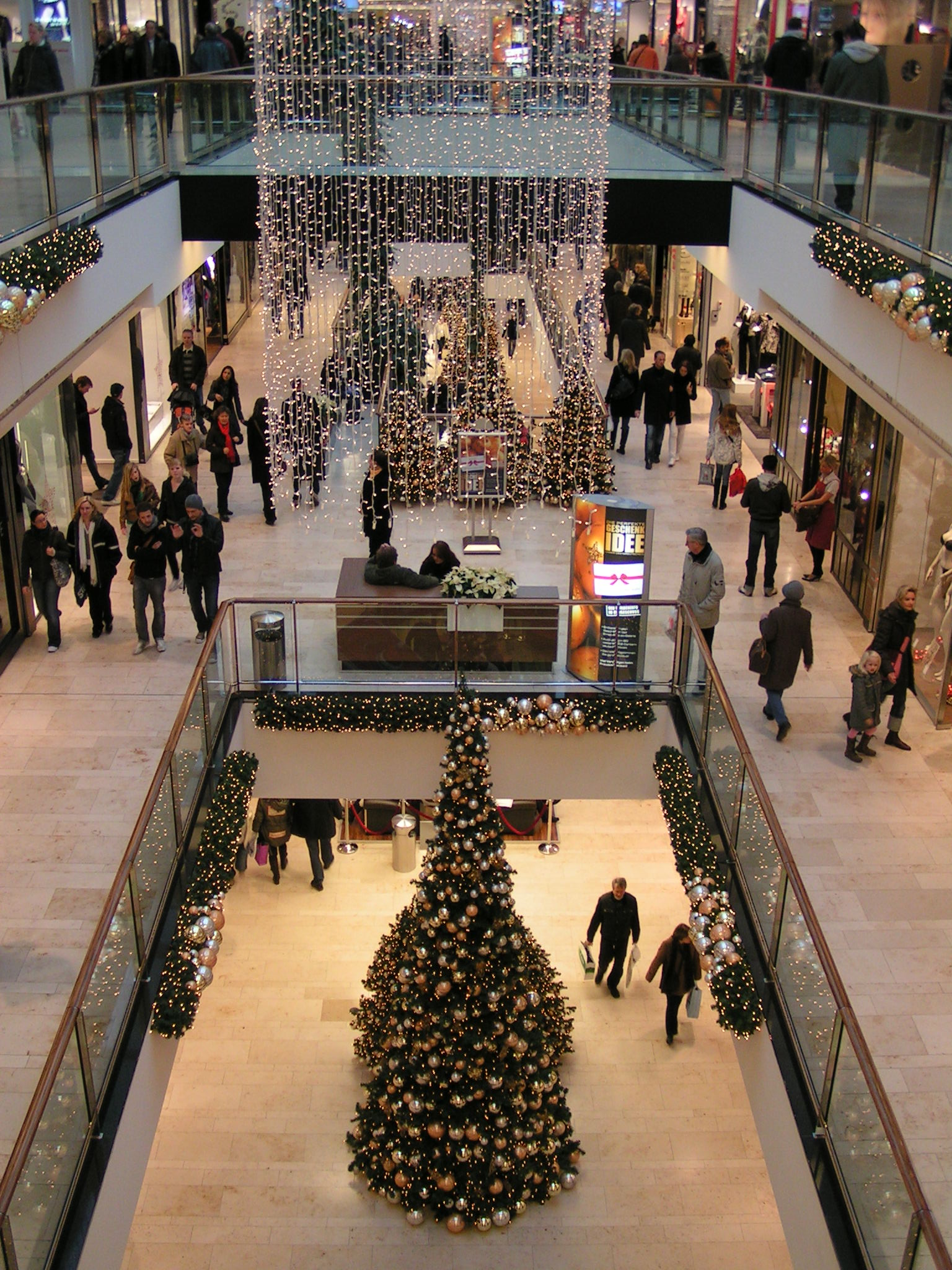 Ernst-August-Galerie Hannover (Advent 2009)